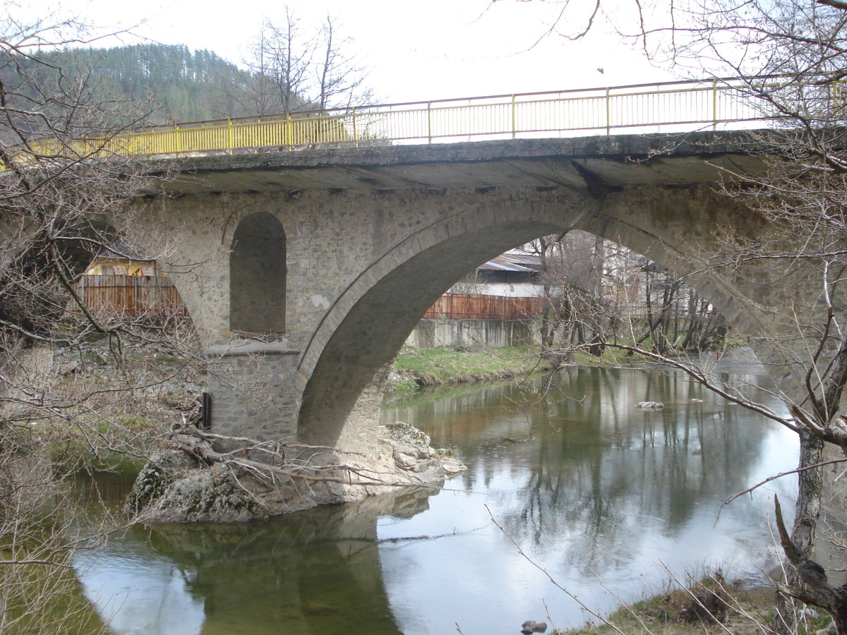 Изглед към Римския мост в Рудозем.